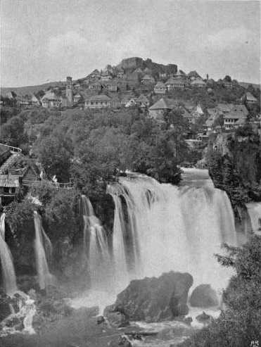 Original description: "Jajace: Bosnia"